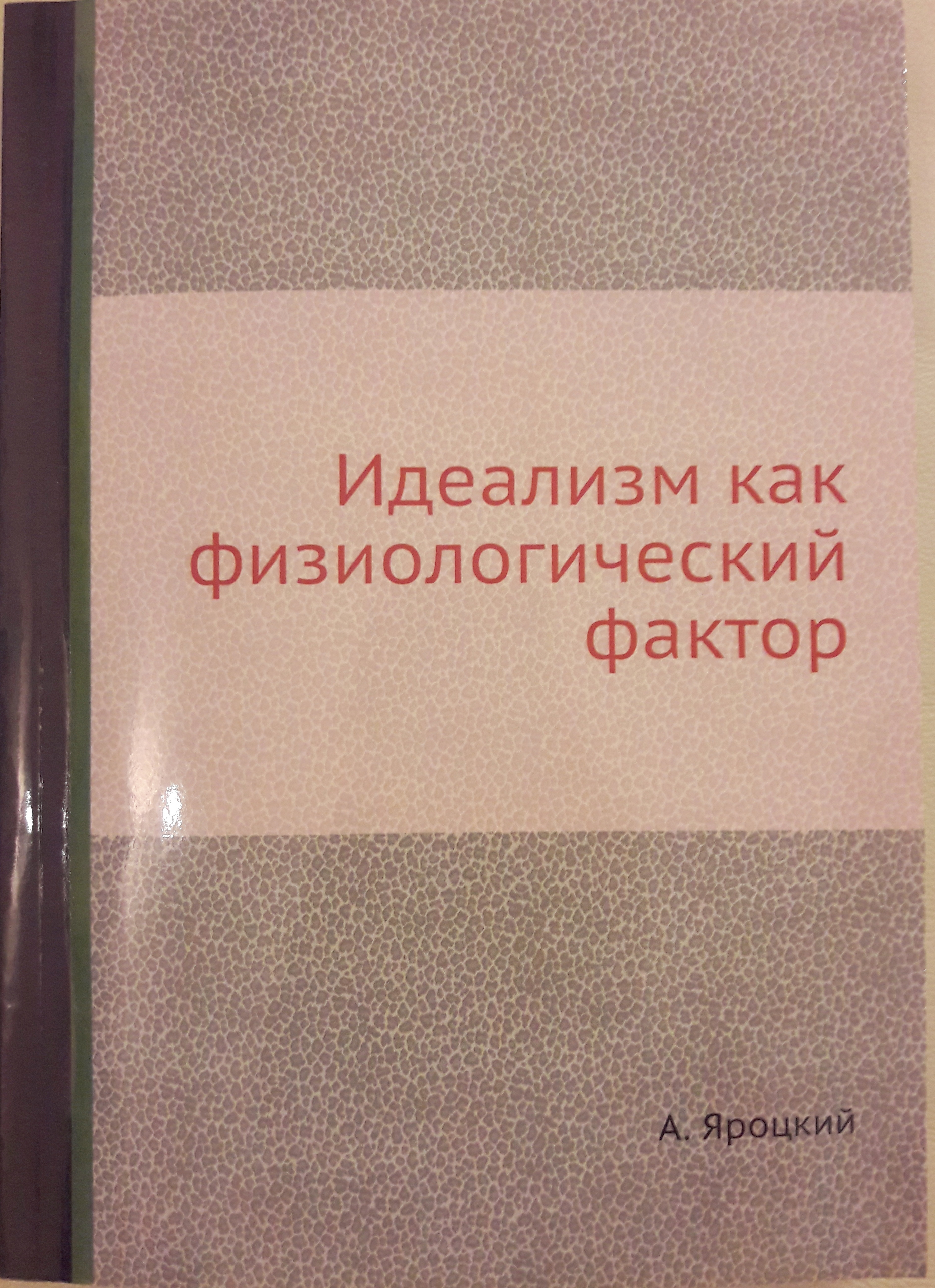 Яроцкий, Александр Иванович (1866-1944). Идеализм, как физиологический фактор / Проф. А. Яроцкий. - Юрьев : тип. К. Маттисен, 1908. - VIII, 302, [1] с.